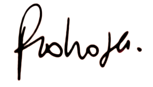 Signature de Cyril Pedrosa.